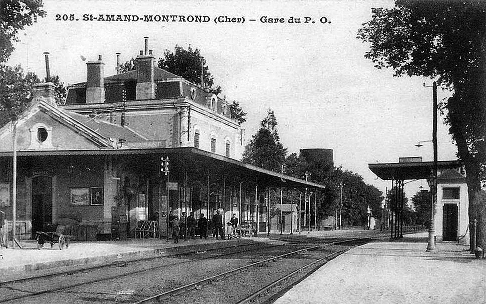 La gare de Saint-Amand-Montrond, avec son bâtiment voyageurs du PO vers 1900